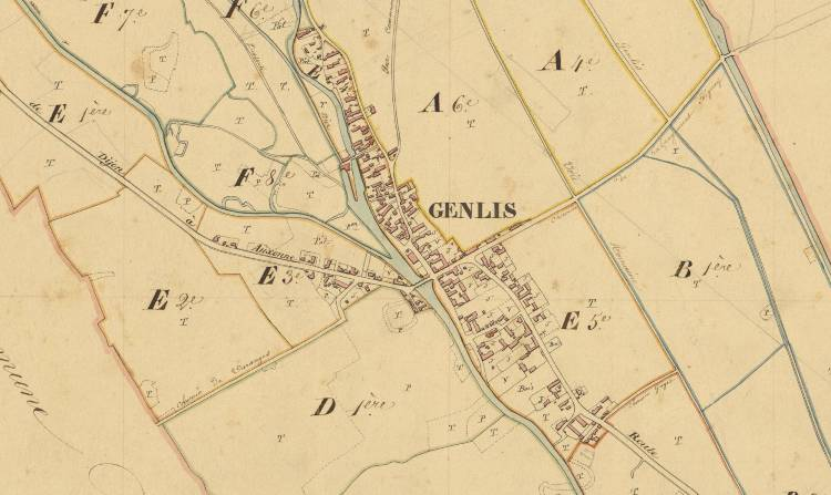 Plan de Genlis en 1843